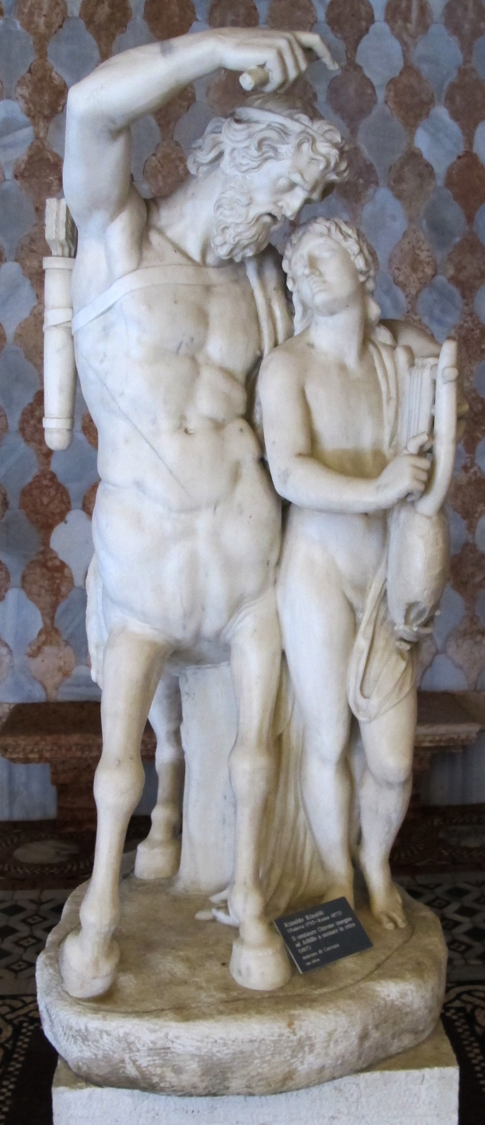 Rinaldo Rinaldi, Chirone insegna ad Achille a suonare la cetra, 1817. Cortile della Ca' d'oro (Venezia).